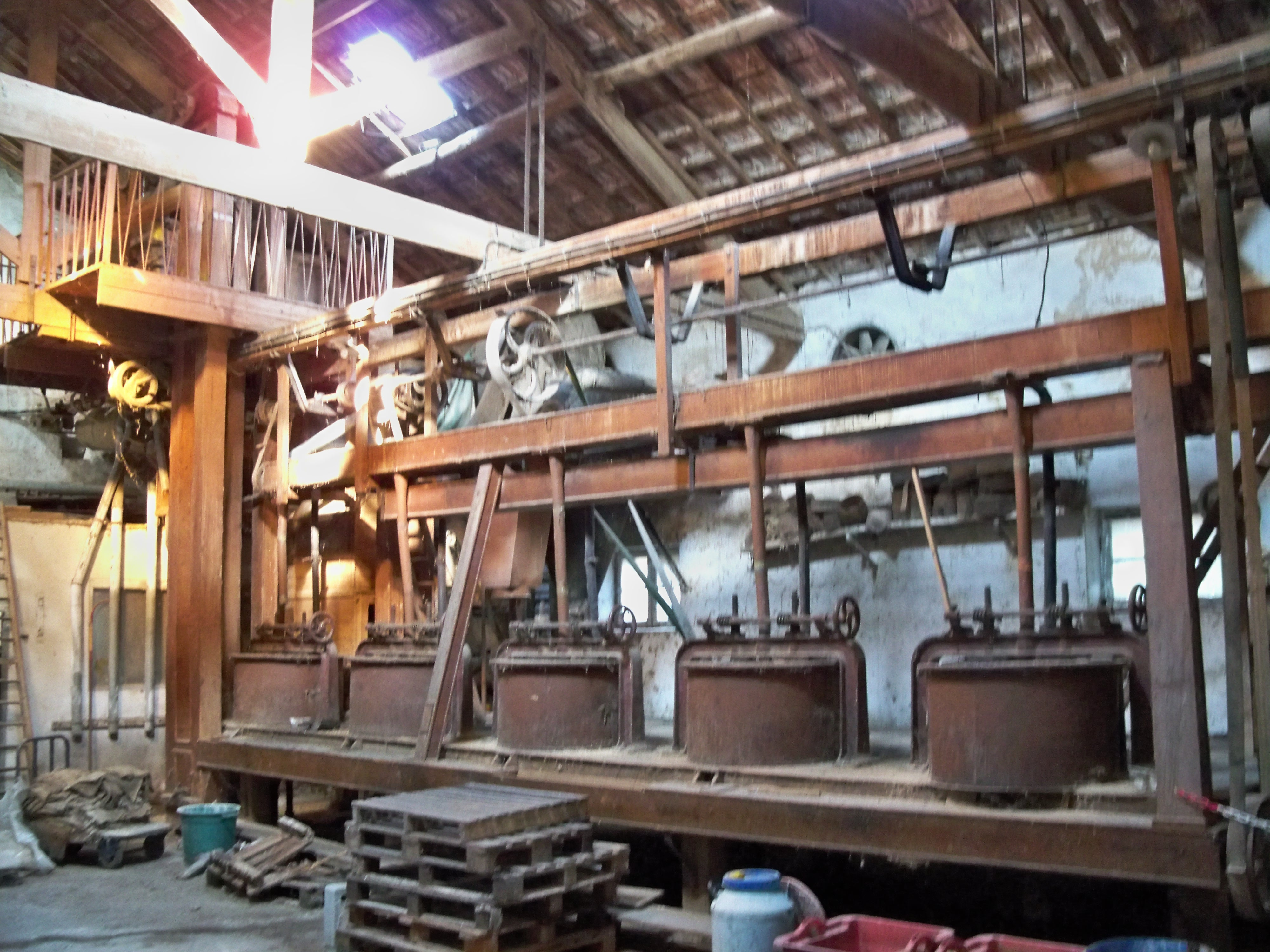 Intérieur de la Graineterie Aimé Roux, Carpentras (84) .